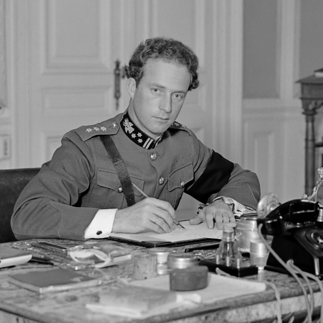 Koning Leopold III achter zijn bureau in het paleis te Laken 1934